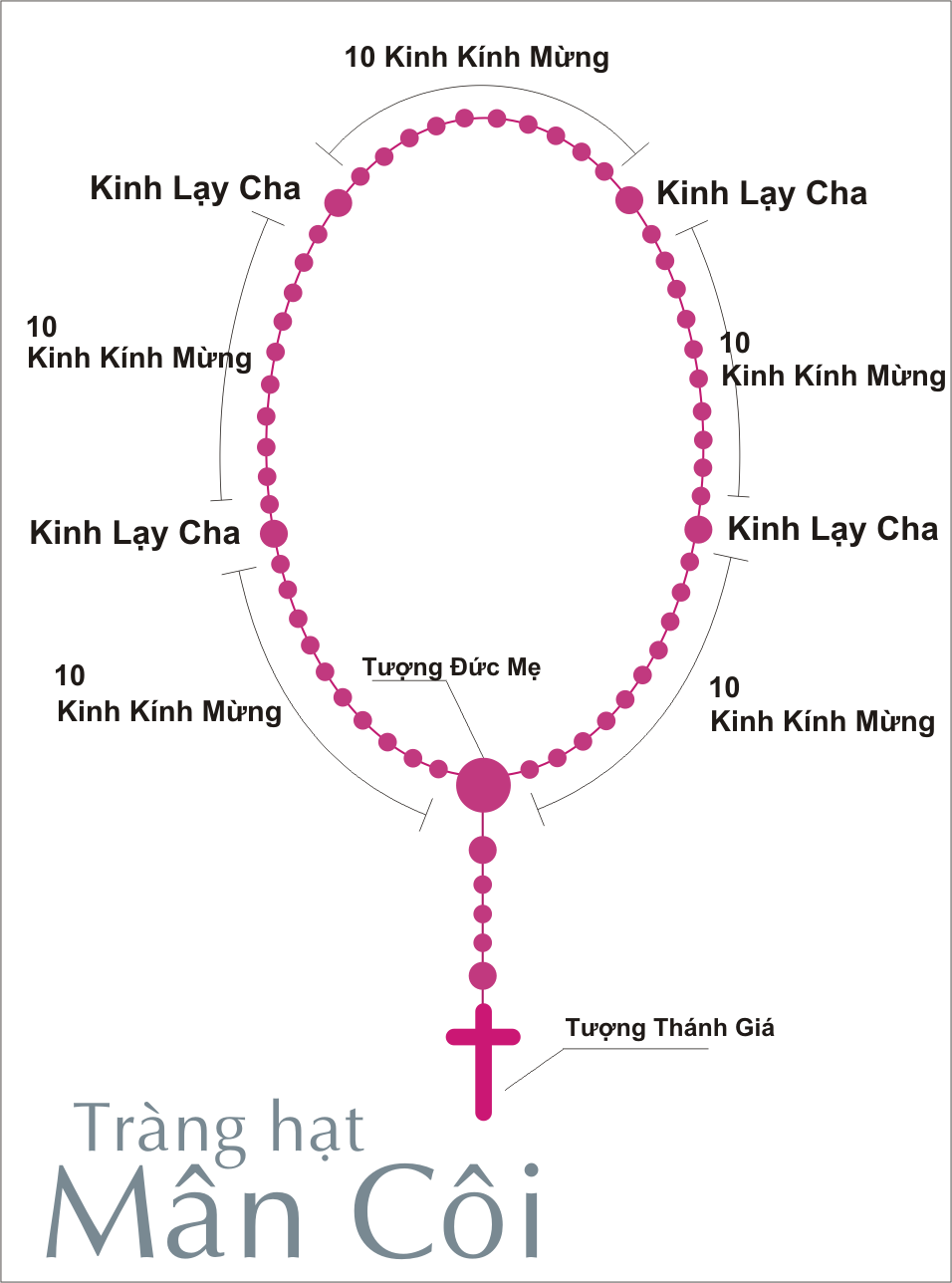 Hình ảnh minh họa cho một chuỗi tràng hạt mân côi.